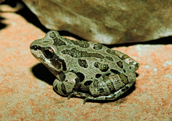 Pseudacris streckeri illinoensis